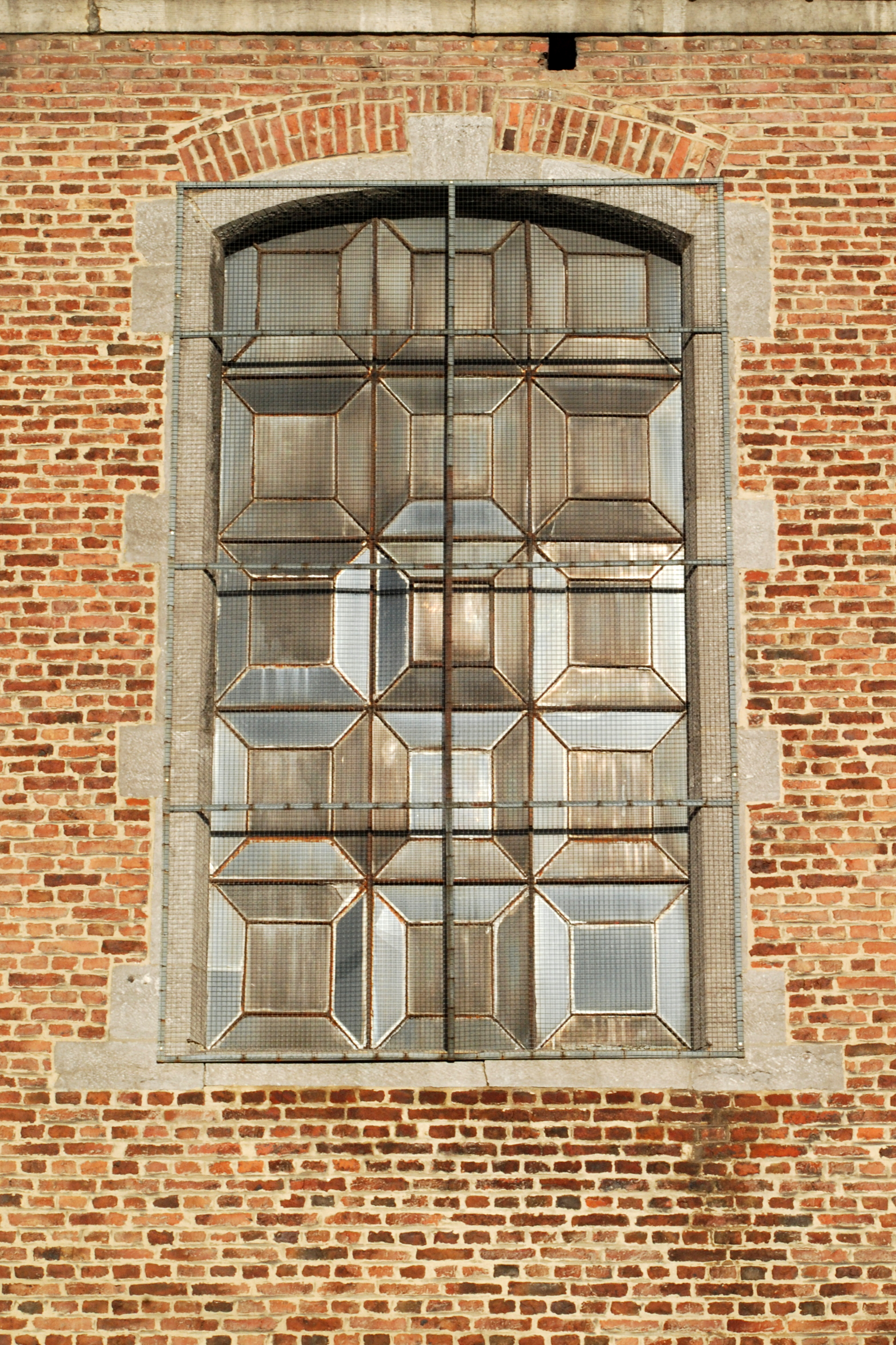 Belgique - Brabant wallon - Genappe - Baisy-Thy - Église Saint-Hubert